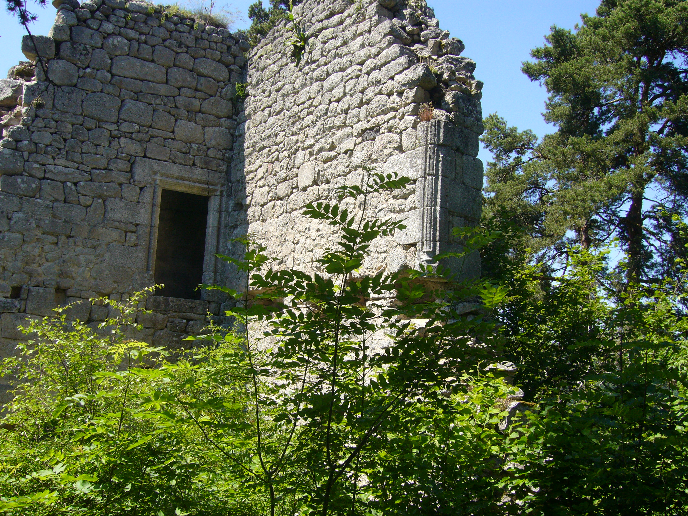 Le château de la Garde, commune d'Albaret-Sainte-Marie, Lozère, France